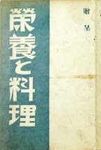 雑誌の表紙